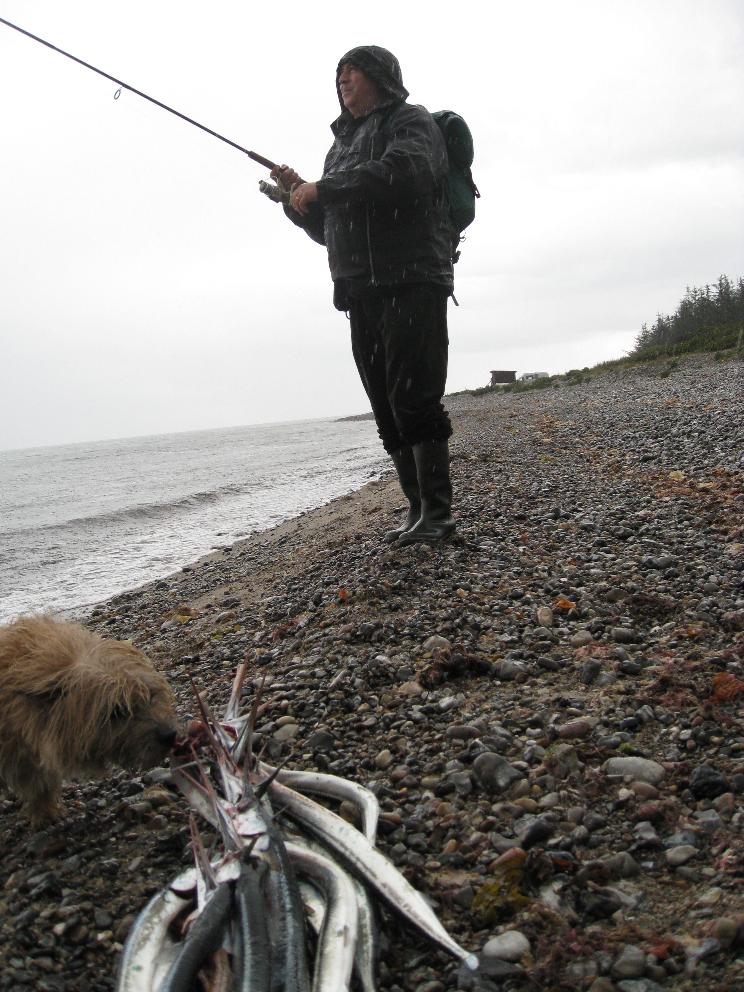 Glatved Strand hornfisk